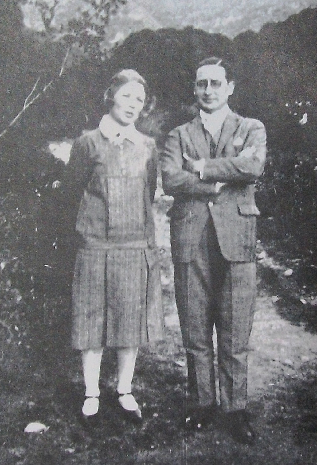 Alfonsina Storni y Fermín Estrella Gutiérrez, en Córdoba, Argentina, en 1922